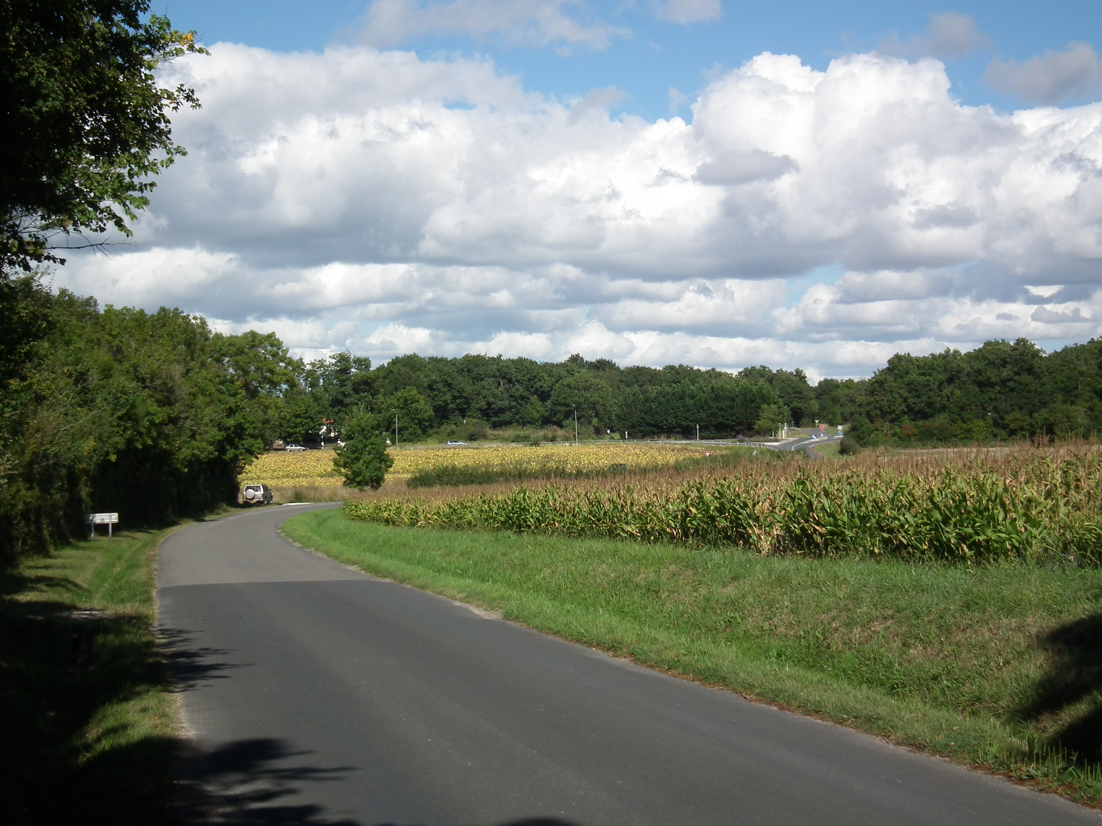 Paysage à Breuillet, Charente-Maritime